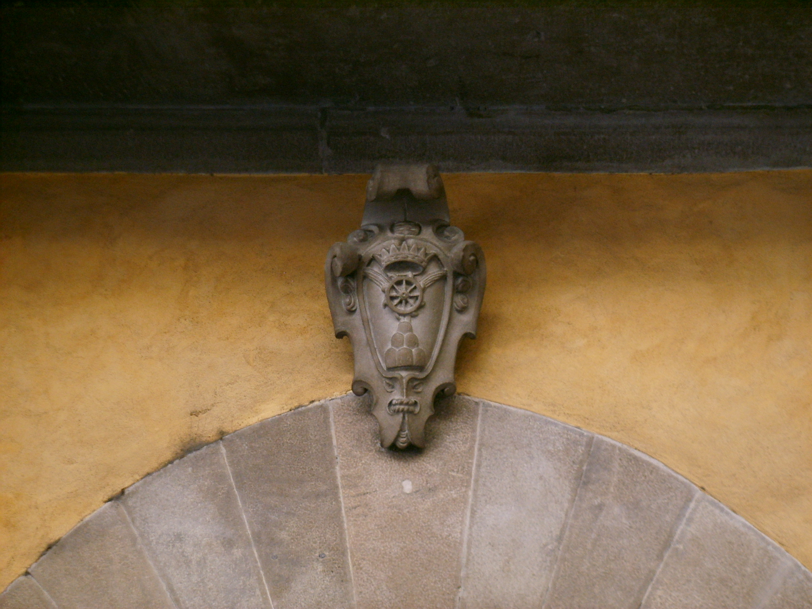 stemma Busini?